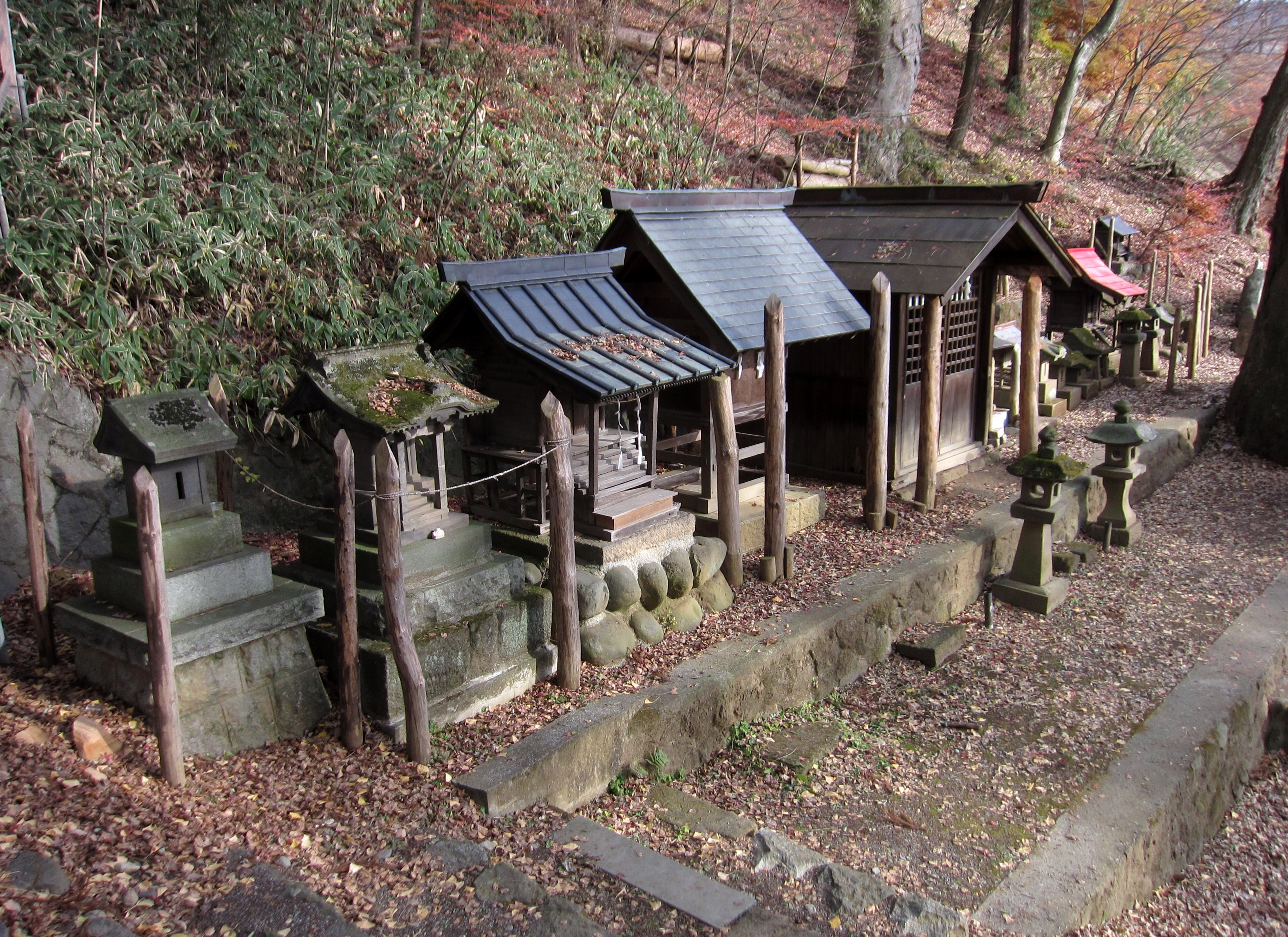 手長神社 摂末社